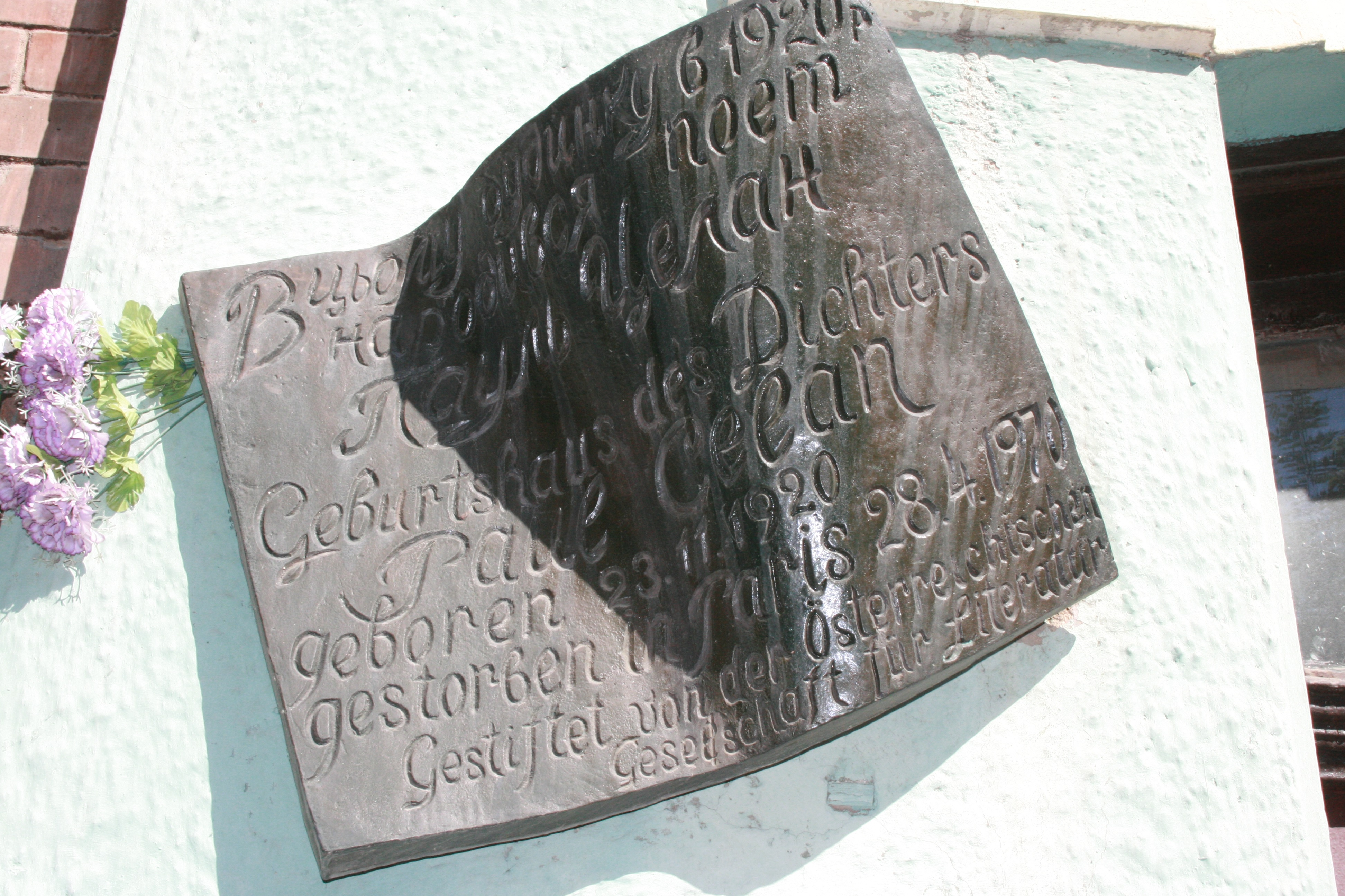 Steinerne Gedenktafel für Paul Celan in Czernowitz.